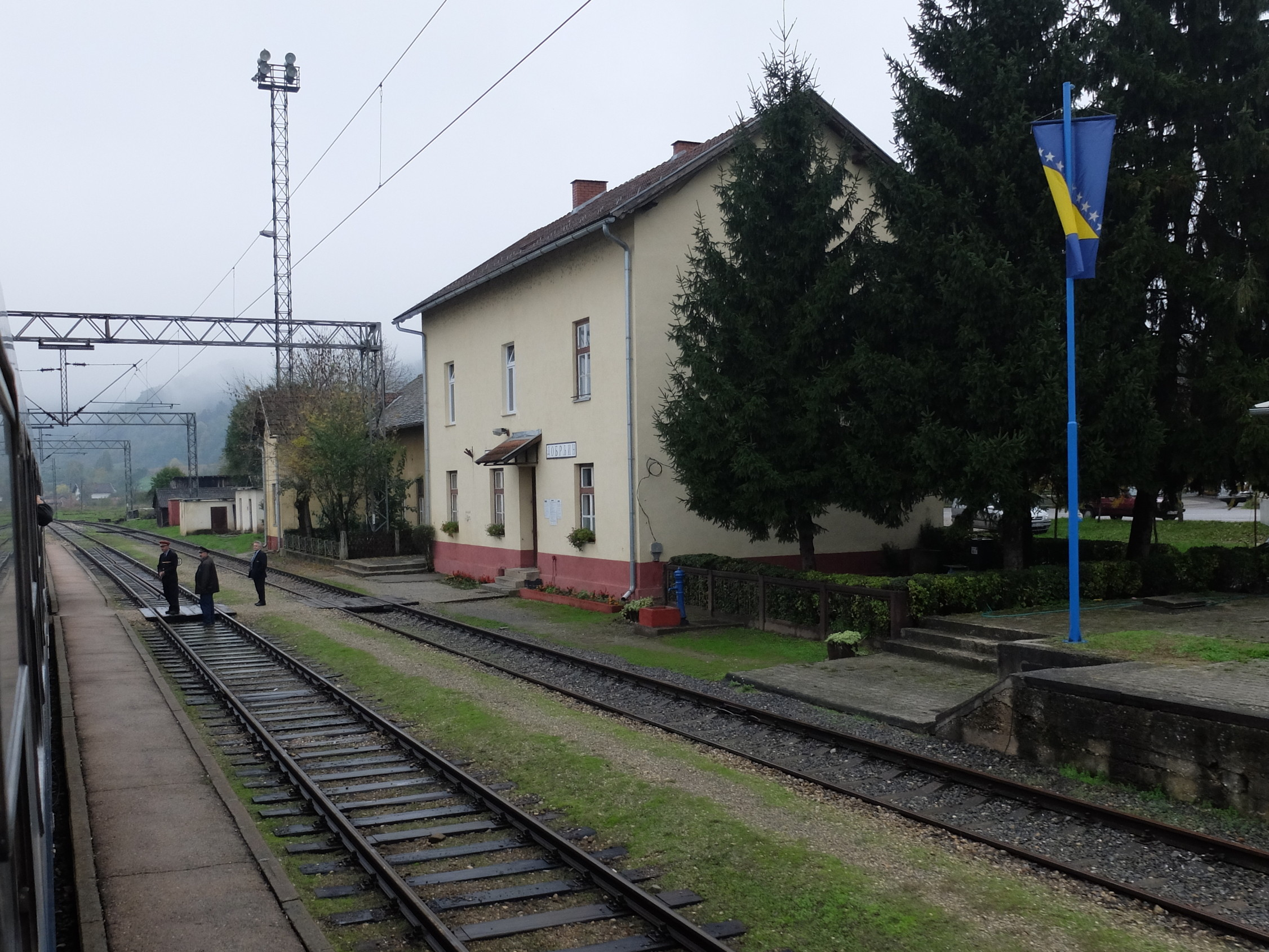 Dobrljin (Grenzbahnhof)